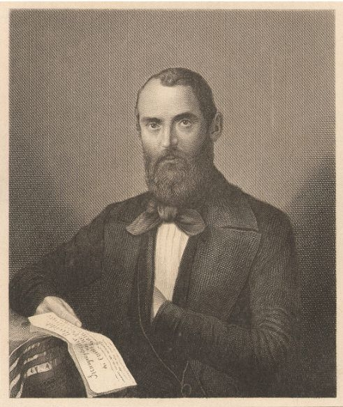 Carl Nauwerck (Auch Karl, auch Nauwerk), Berliner Hochschullehrer